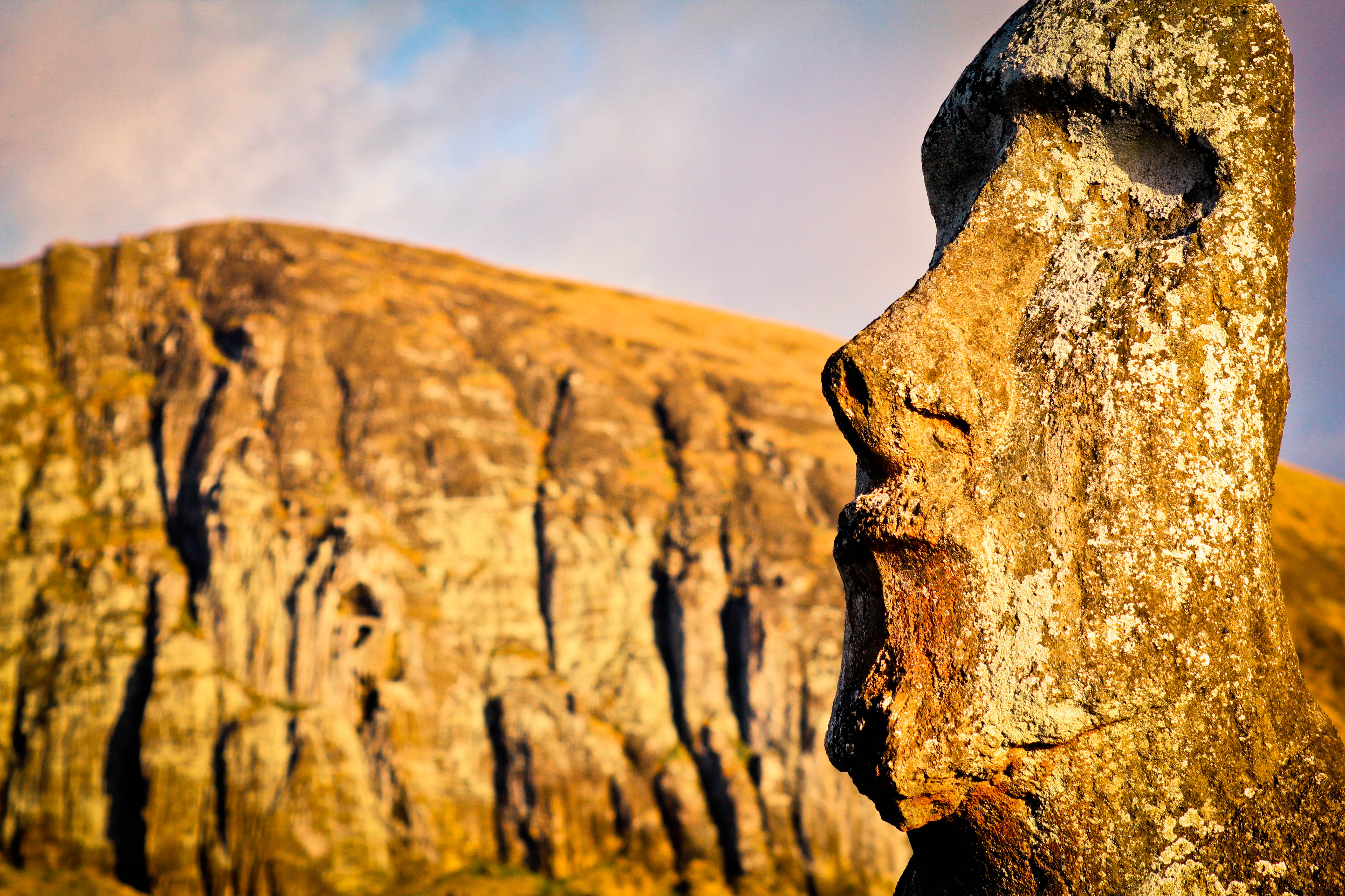 Amanecer Moai Rano Raraku